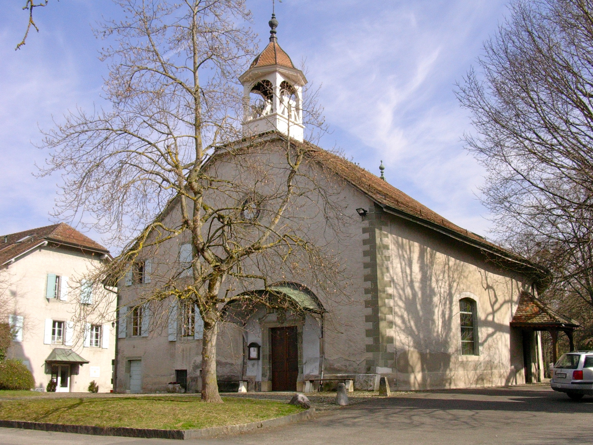 Le temple de Cartigny